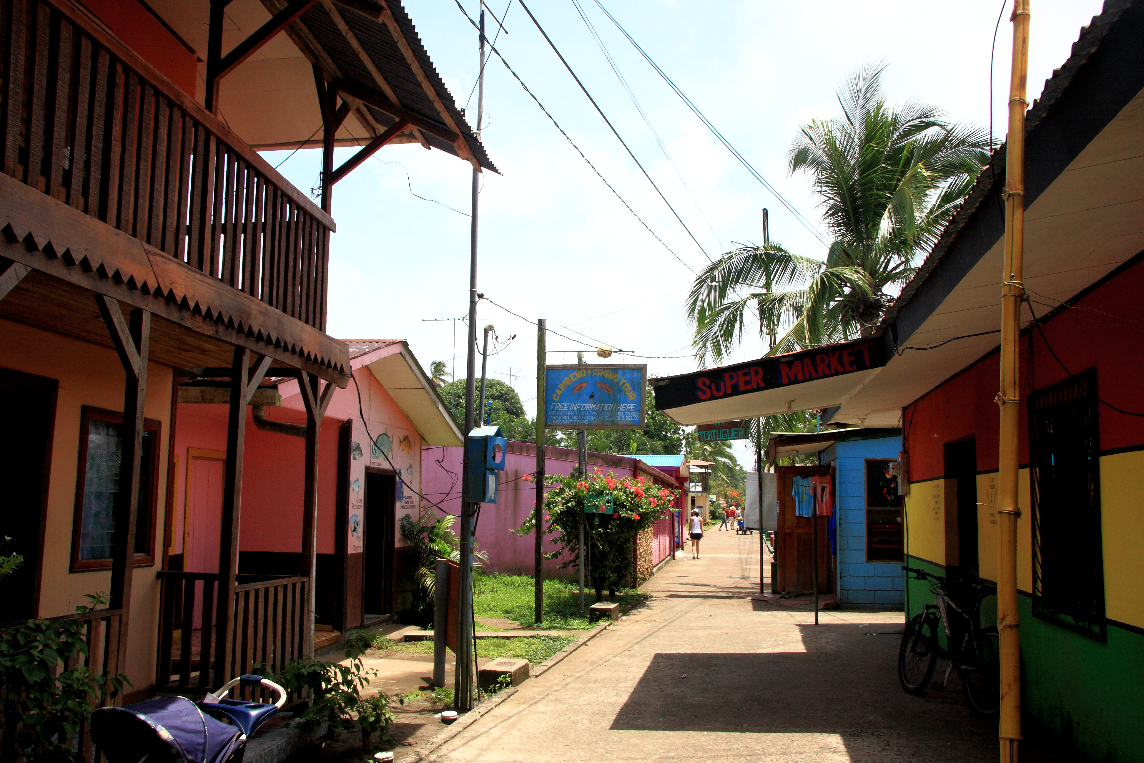 Tortuguero village, Costa Rica